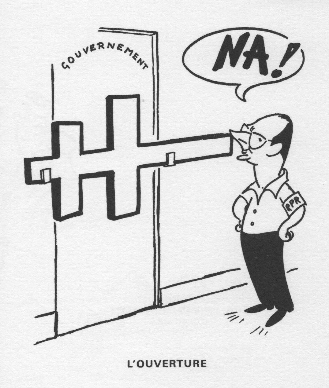 recueil de dessins et caricatures paru en 1980